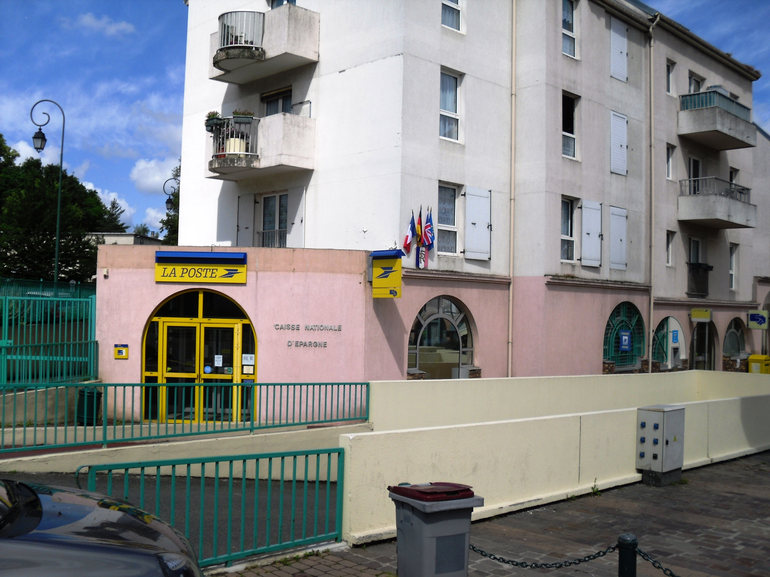 Agence postale de Villebon-sur-Yvette (91)